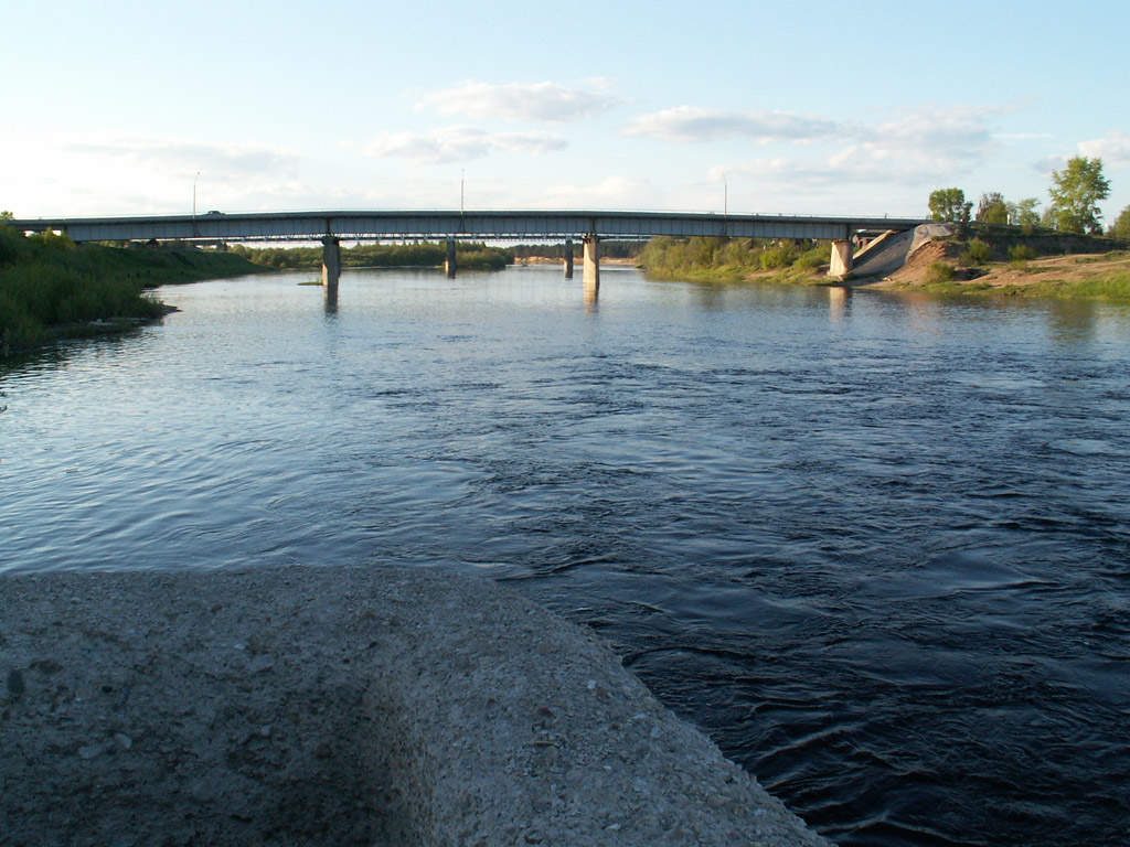 река Вага, Автомобильный мост построен в 1966, капремонт в 1987, разрушился в 2015....